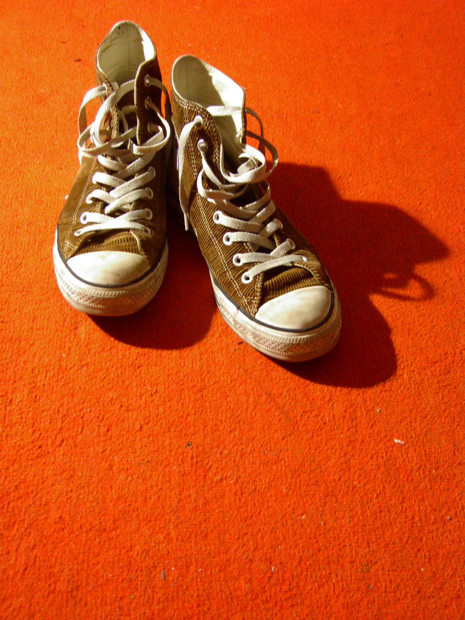 Converse. Converseskor av Manchester.My shoes